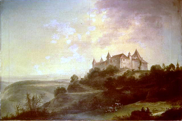 Schloss Kyburg, Blick von Südwesten. Öl auf Leinwand; 43.5 cm x 65 cm Schweizerisches Nationalmuseum, Zürich, LM-22849